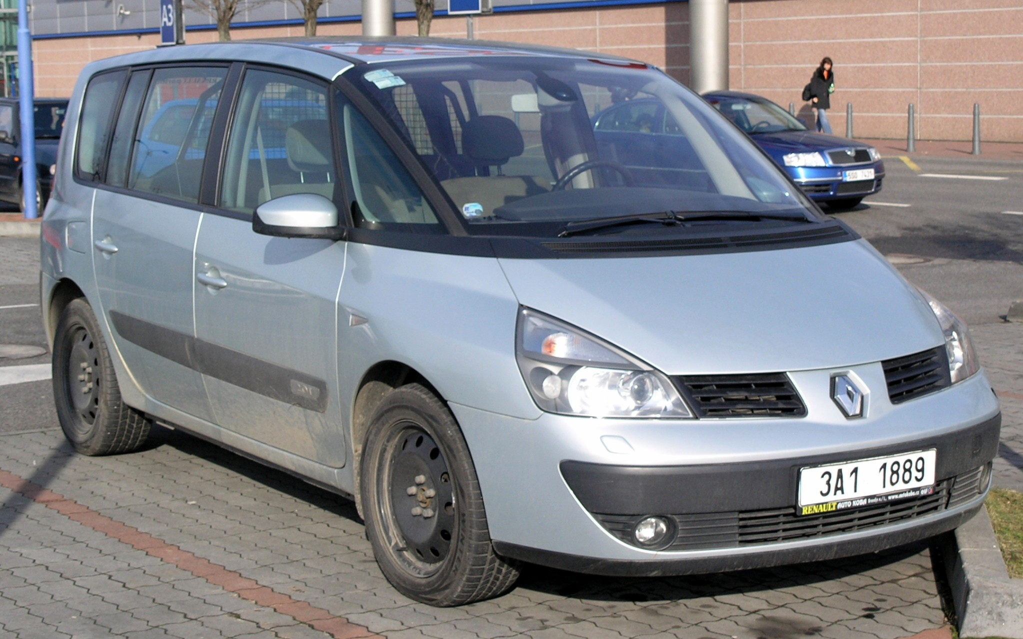 Renault Espace 2.0 T, Phase I